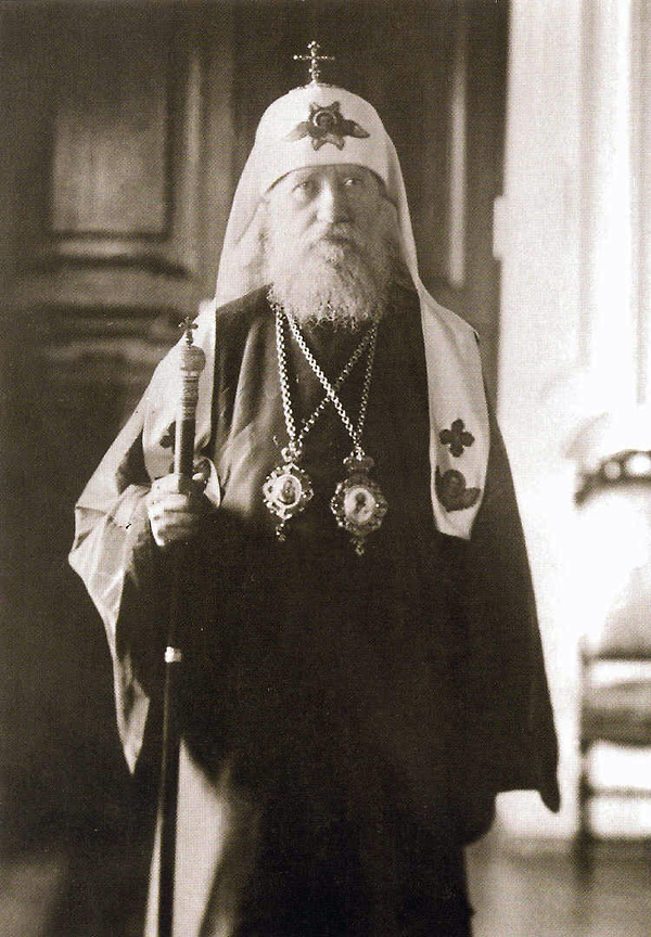 Photo: Der Patriarch und Heilige der Russisch-Orthodoxen Kirche Tichon (Patriarch von Moskau) (1865 – 1925)